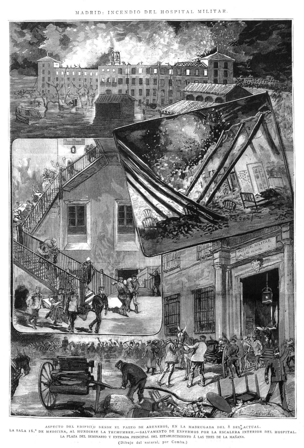 Madrid. Incendio del hospital militar, dibujo de Juan Comba, grabado publicado en la revista española La Ilustración Española y Americana.